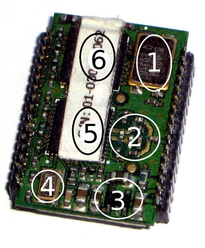 ZigBee